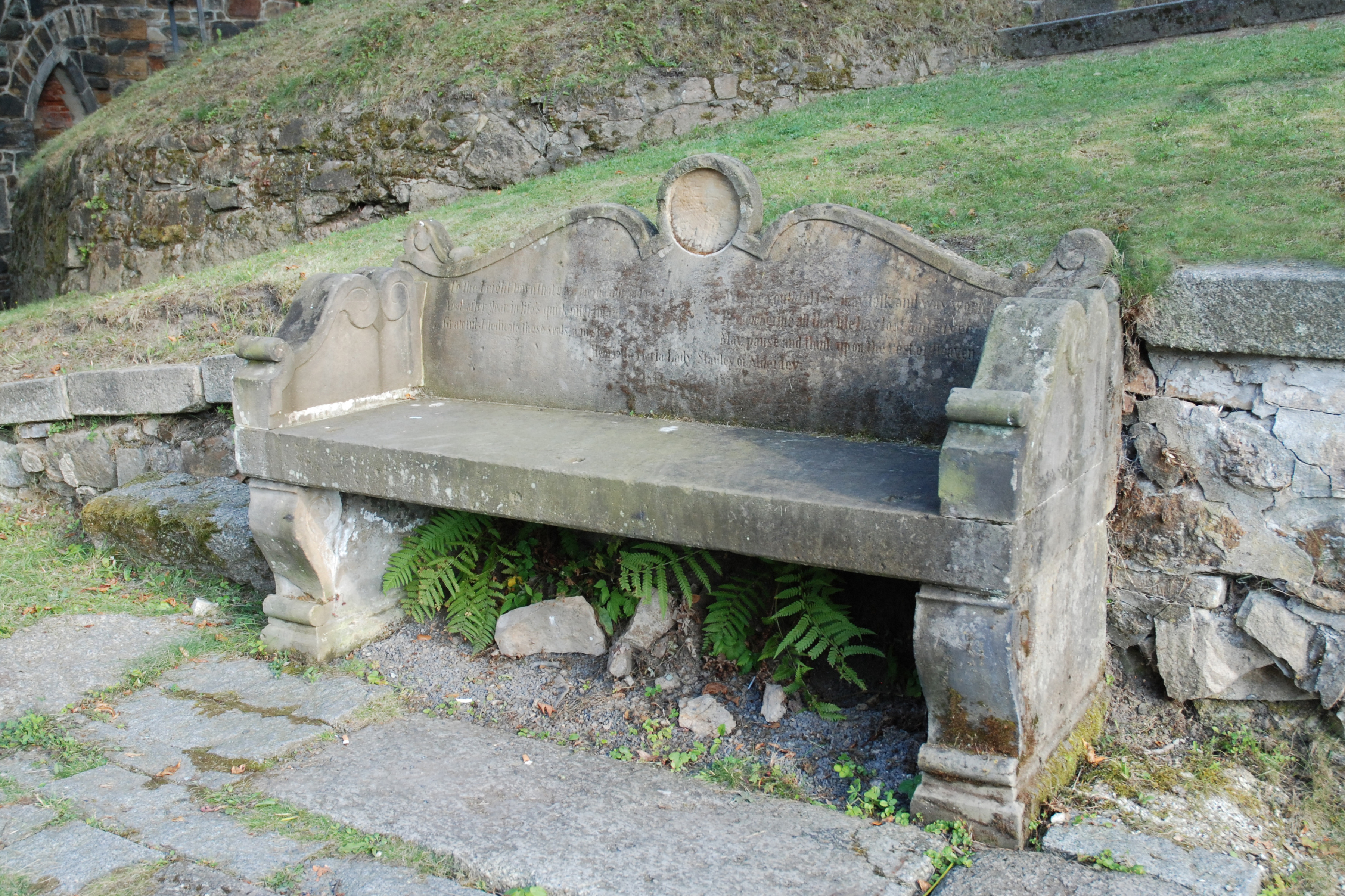 Lavička v Karlových Varech u kostela svatého Lukáše na levé straně přístupového schodiště